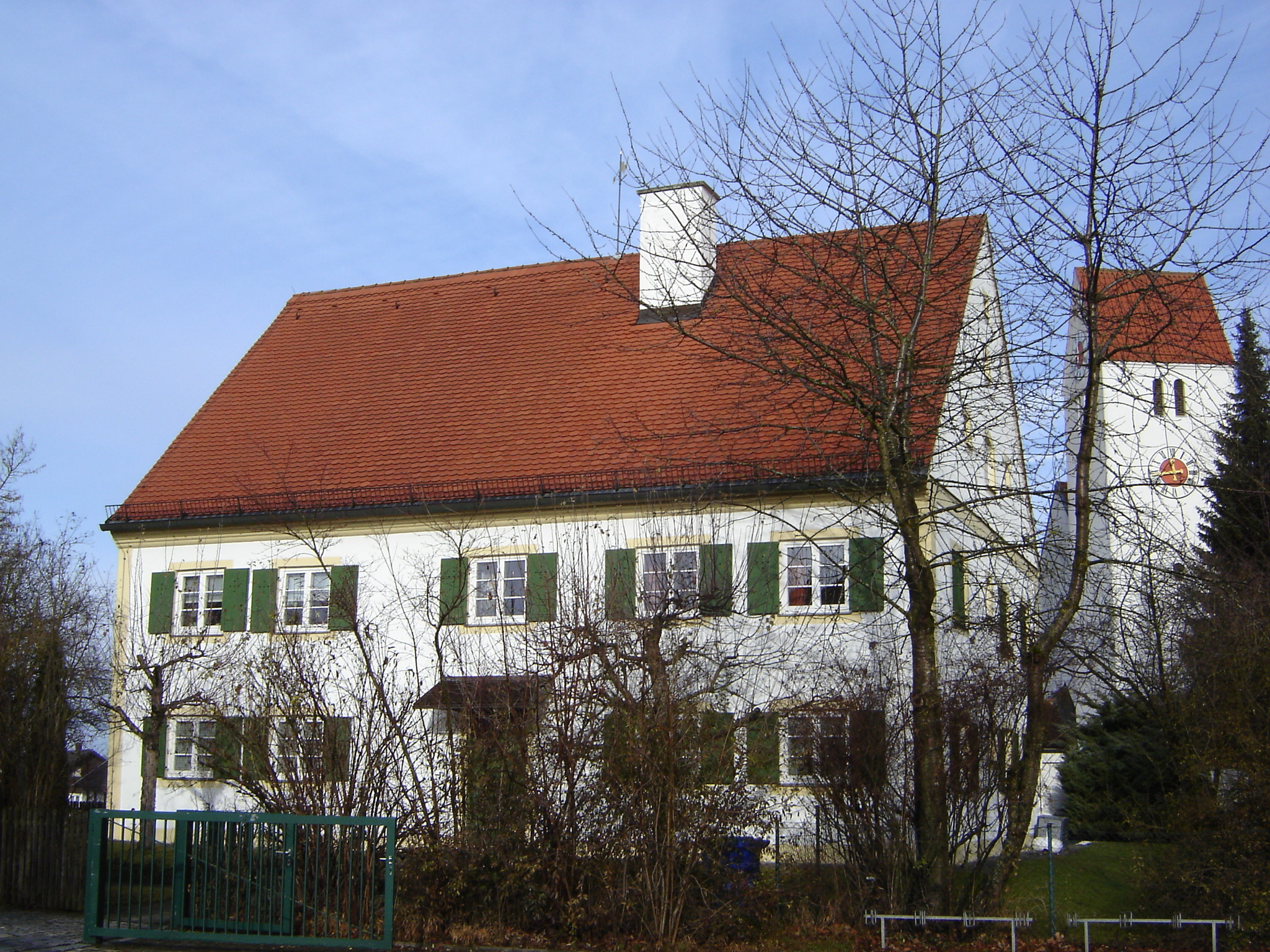 Der Pfarrhof mit der Dorfkirche Maria Himmelfahrt in Puchheim-Ort